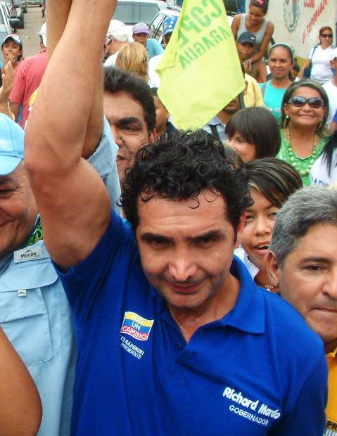 Richard Mardo en una caminata por el Estado Aragua.